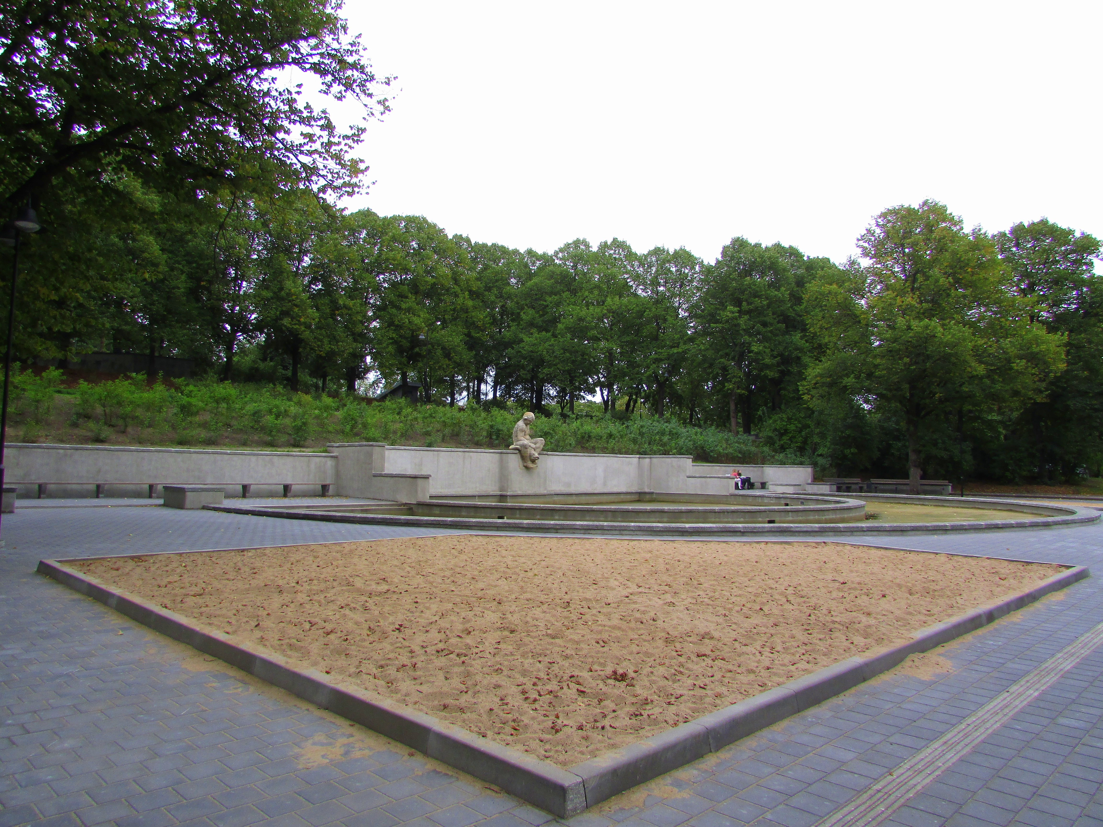 Grīziņkalna parks, Rīga, Pērnavas iela